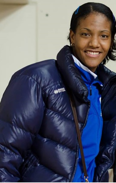 Rosir Calderón, pallavolista cubana, gioca nel ruolo di schiacciatrice